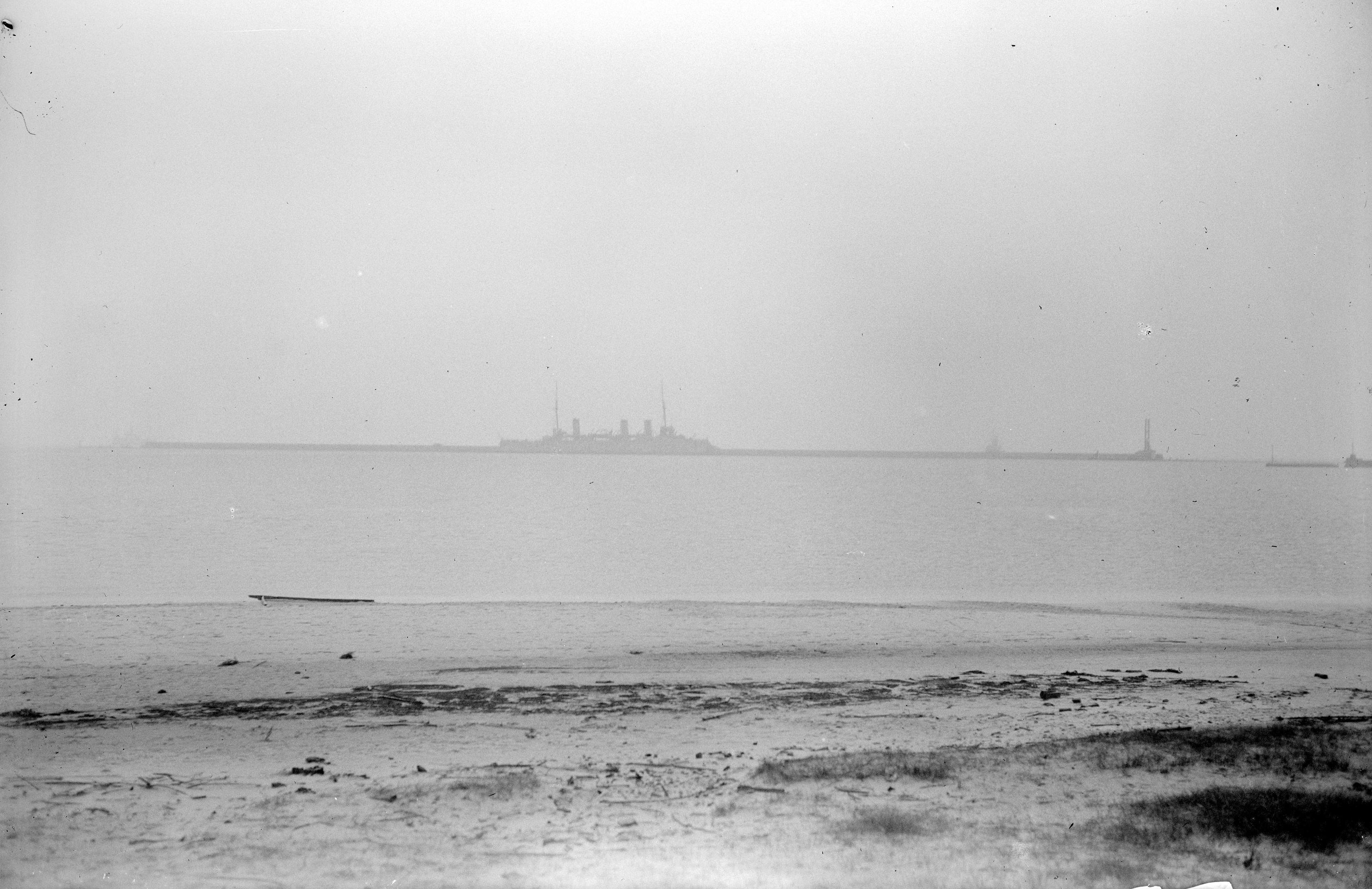 Zatoka Gdańska w rejonie Gdyni. W oddali ORP Bałtyk.